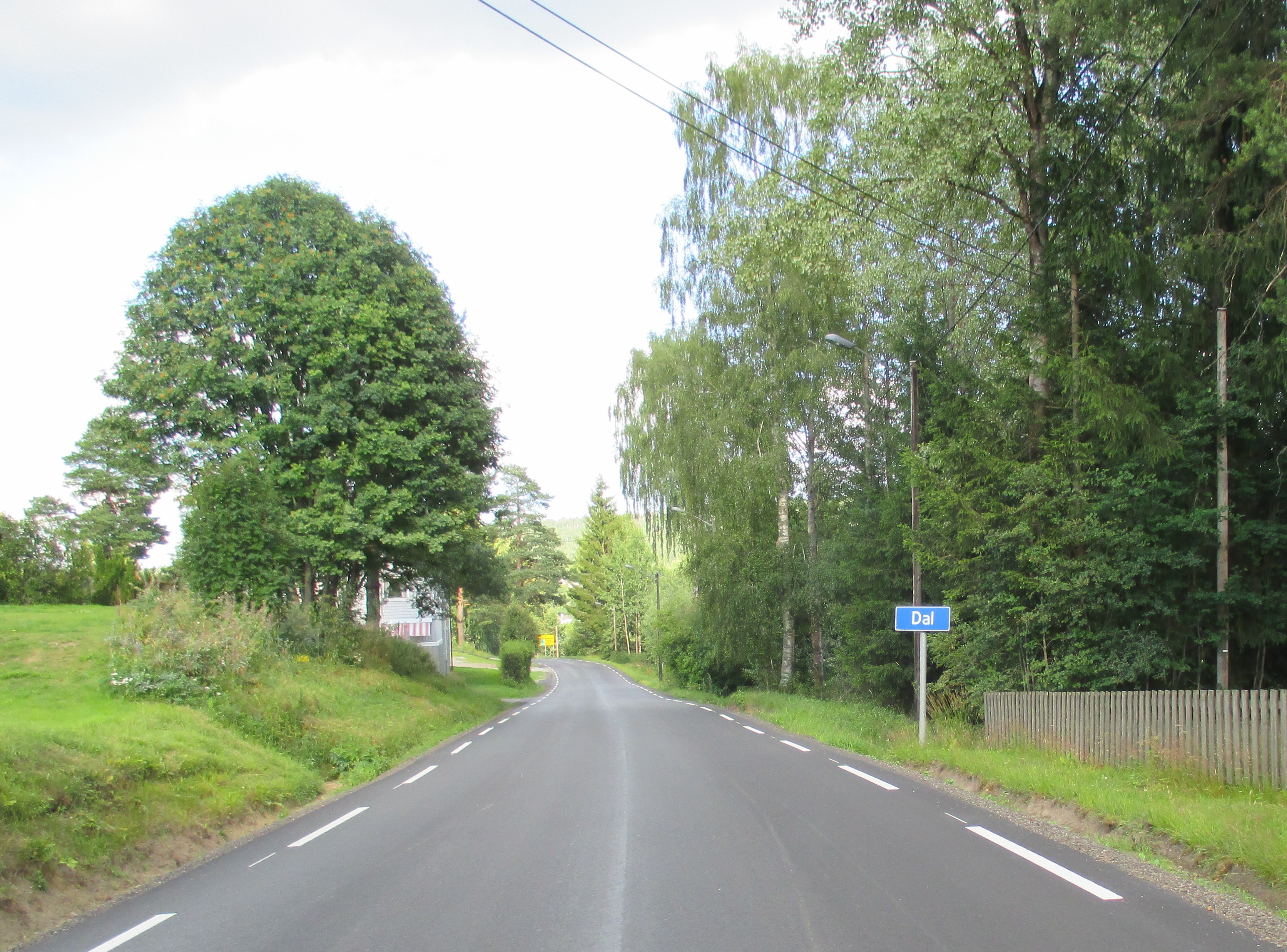 Fylkesvei 504 går inn i Dal vestfra